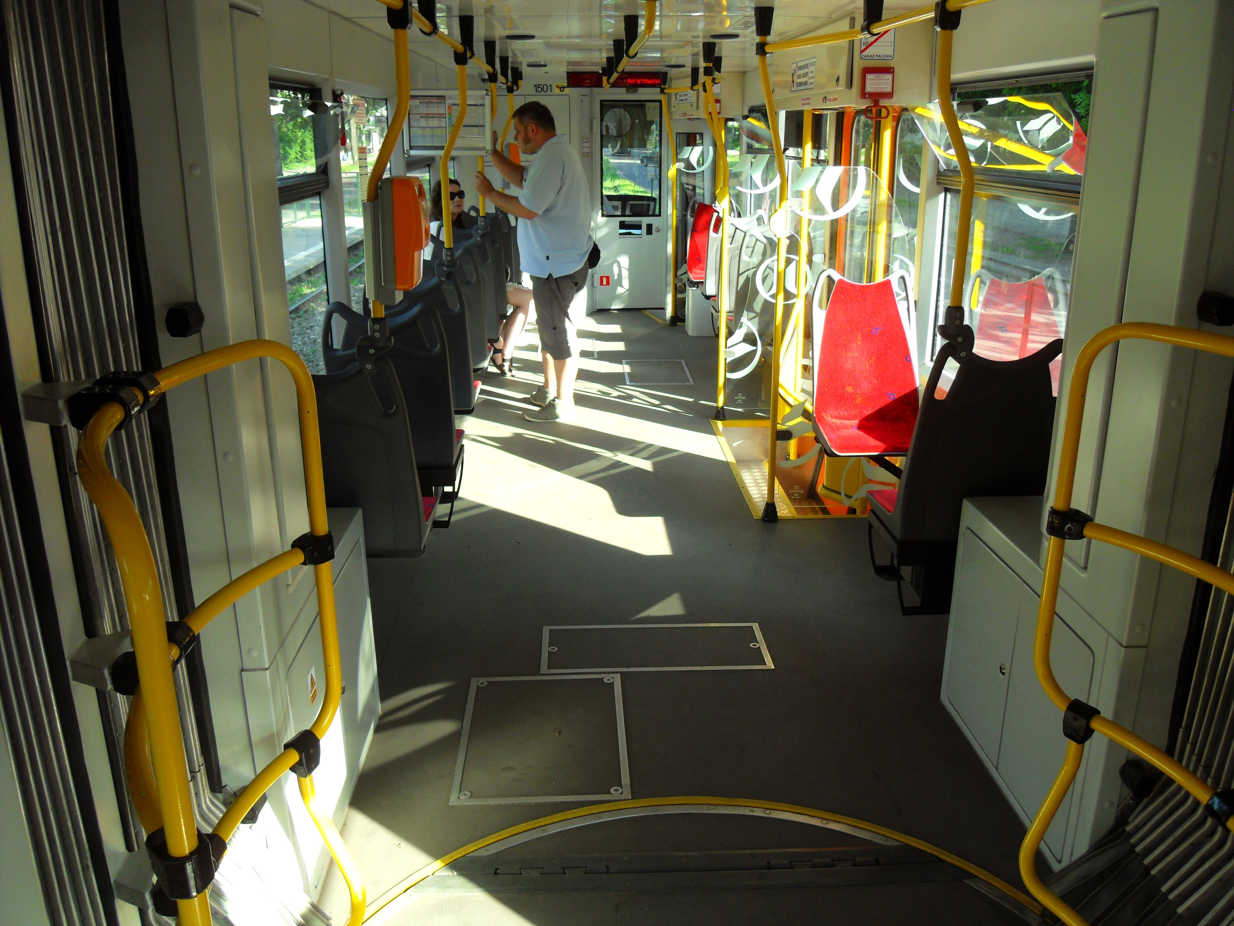 Konstal 114Na (#1501) w Gdańsku po modernizacji.